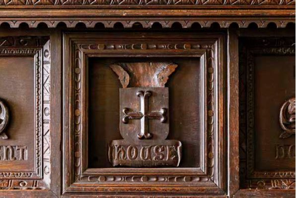 Rhan Chwith Aelwyd Southover Grange - Llun gyda chaniatâd Carlotta Luke (2016)